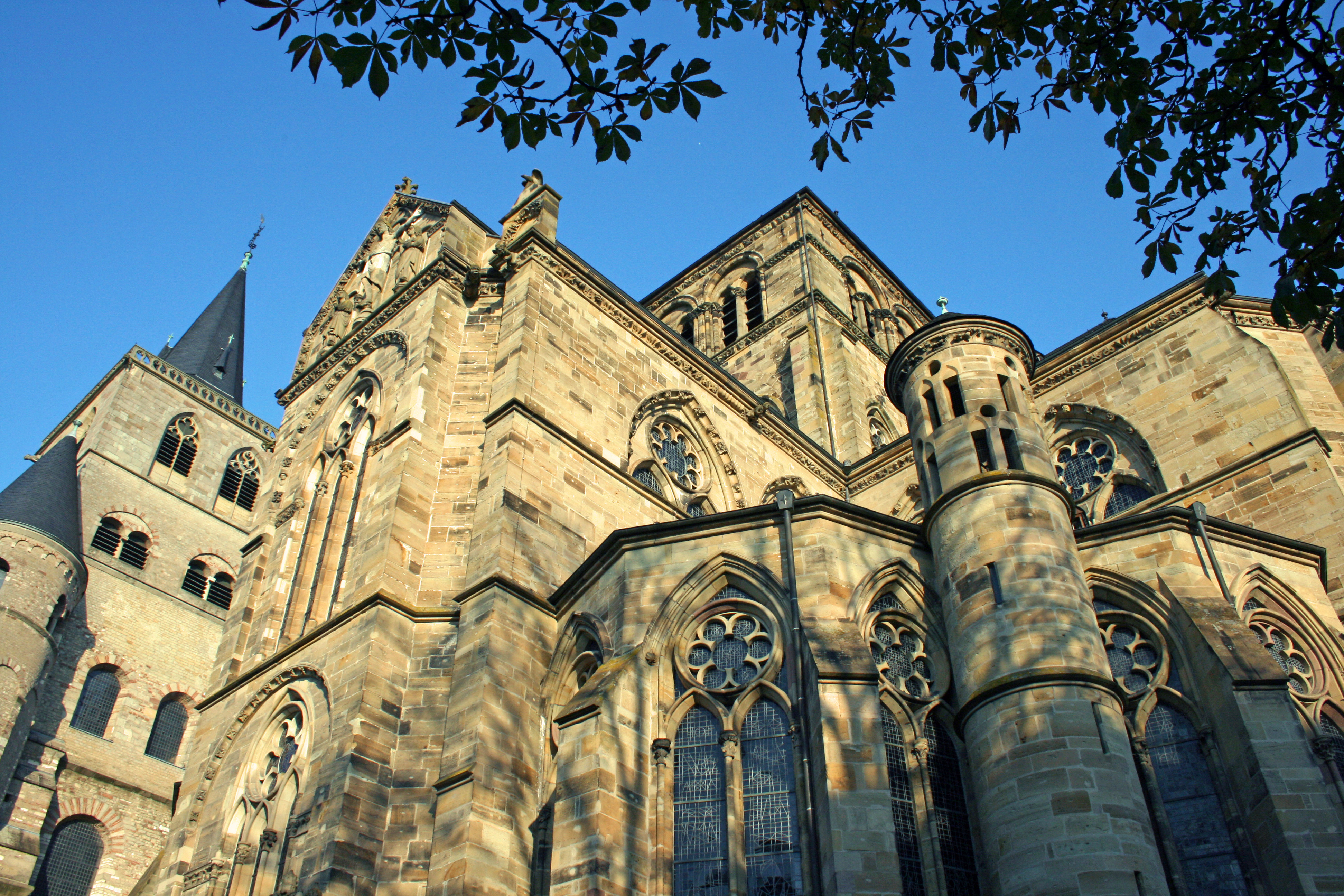 Liebfrauenkirche